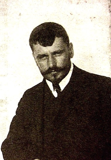 Российский социалист-революционер Пётр Моисеевич Рутенберг (1878-1942)